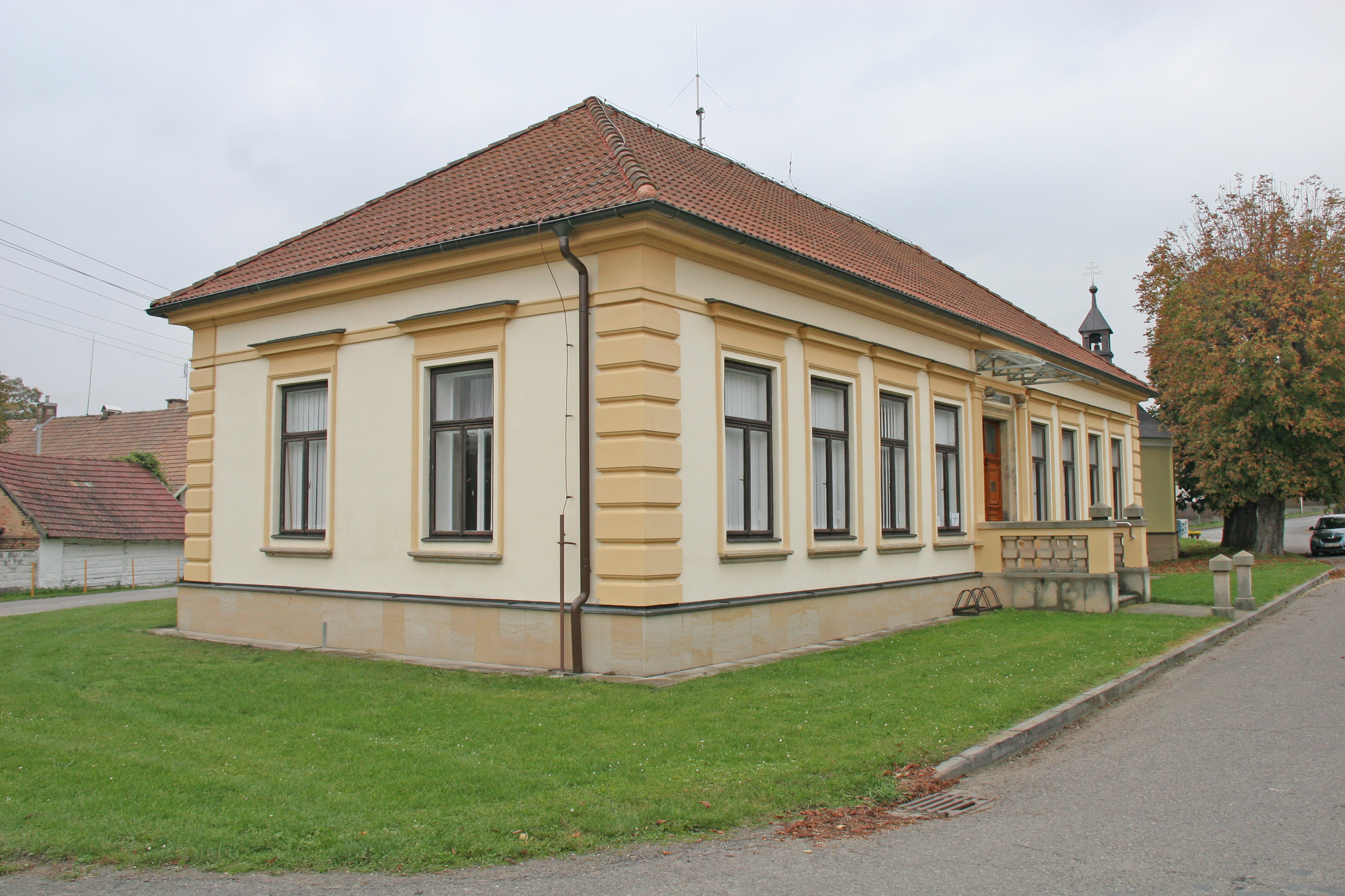 Očelice obecní úřad